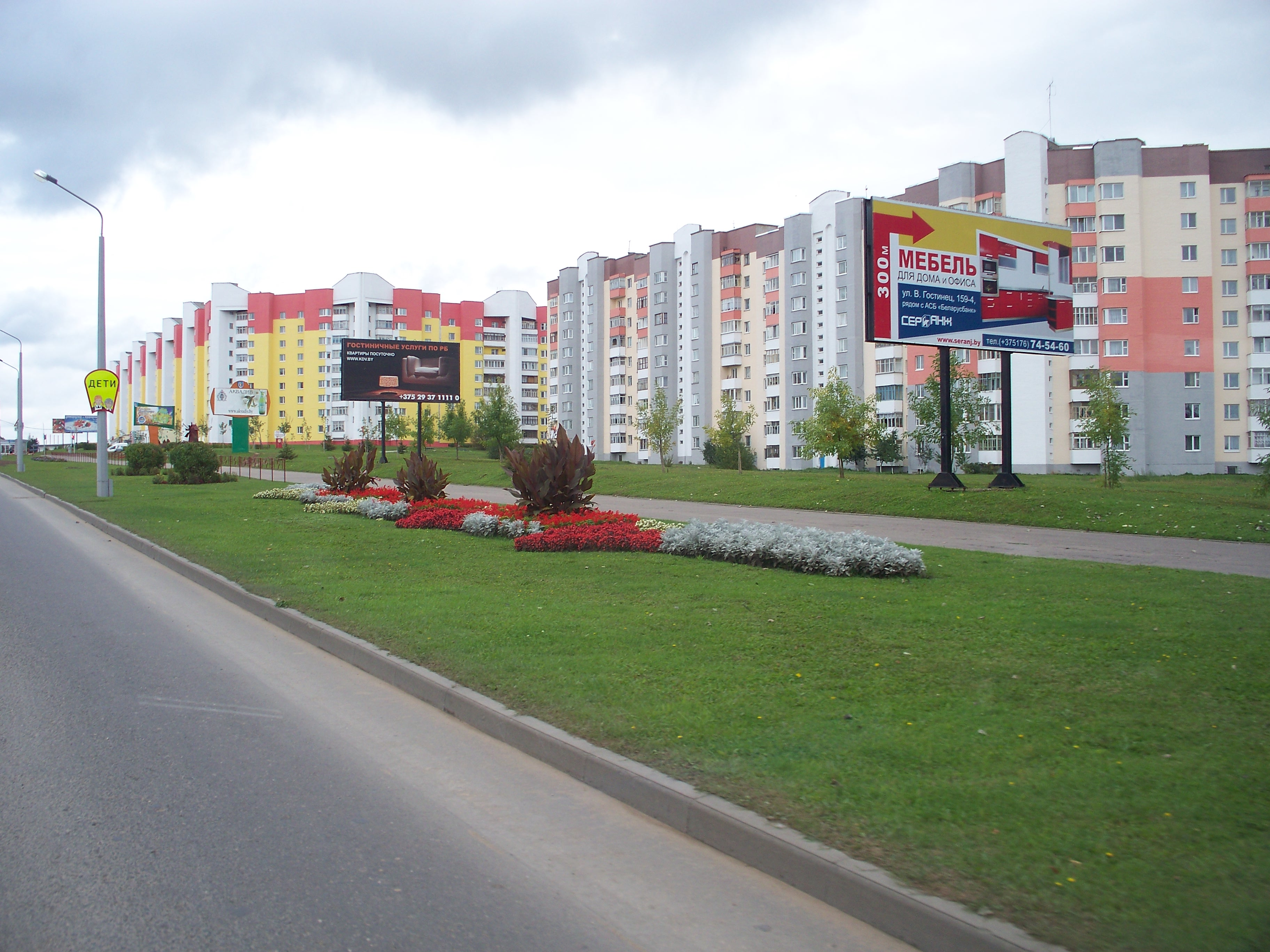 6-микрорайон